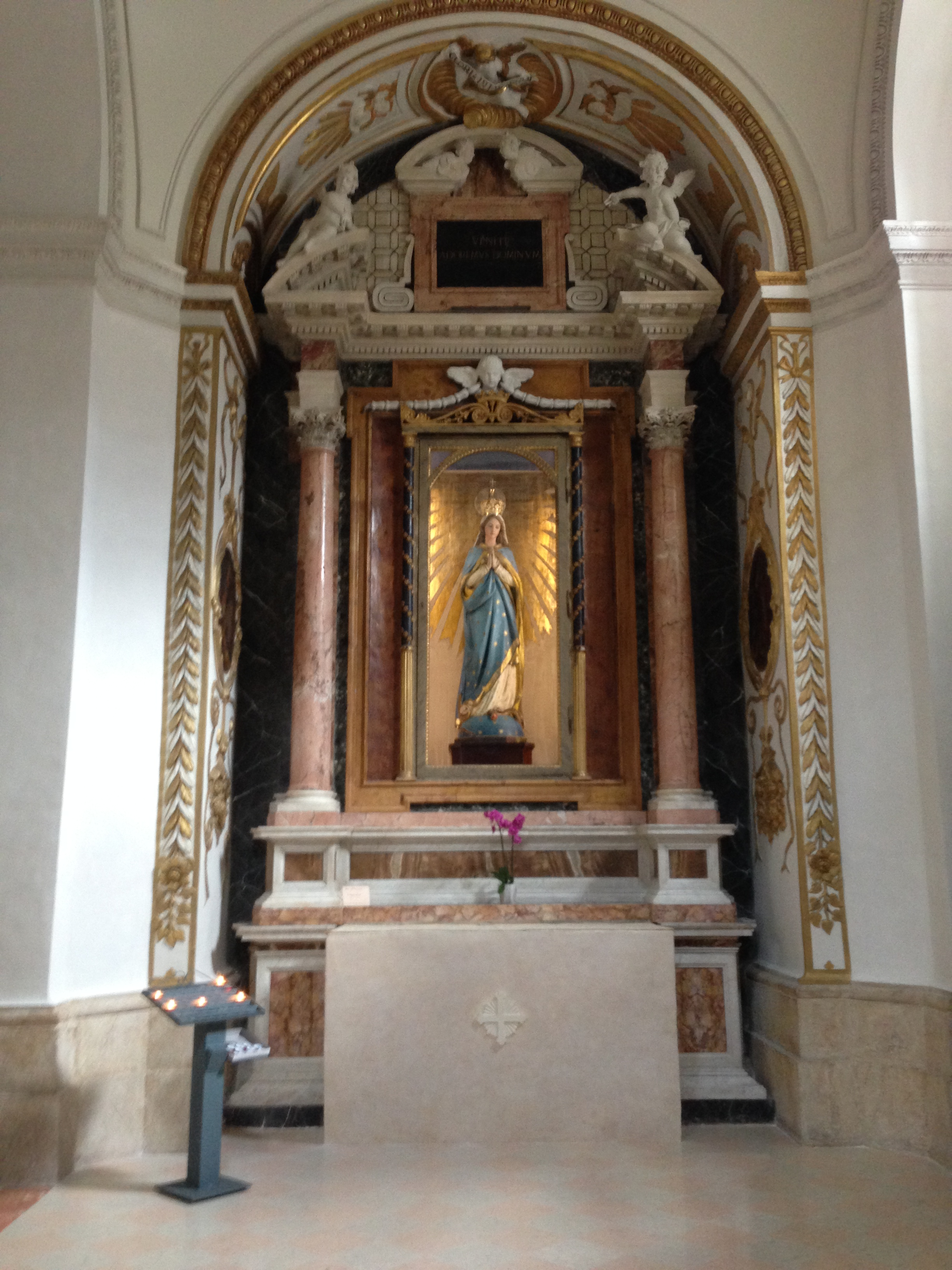 Altare dell'Immacolata Statua in legno di Ortisei, seconda metà sec XIX